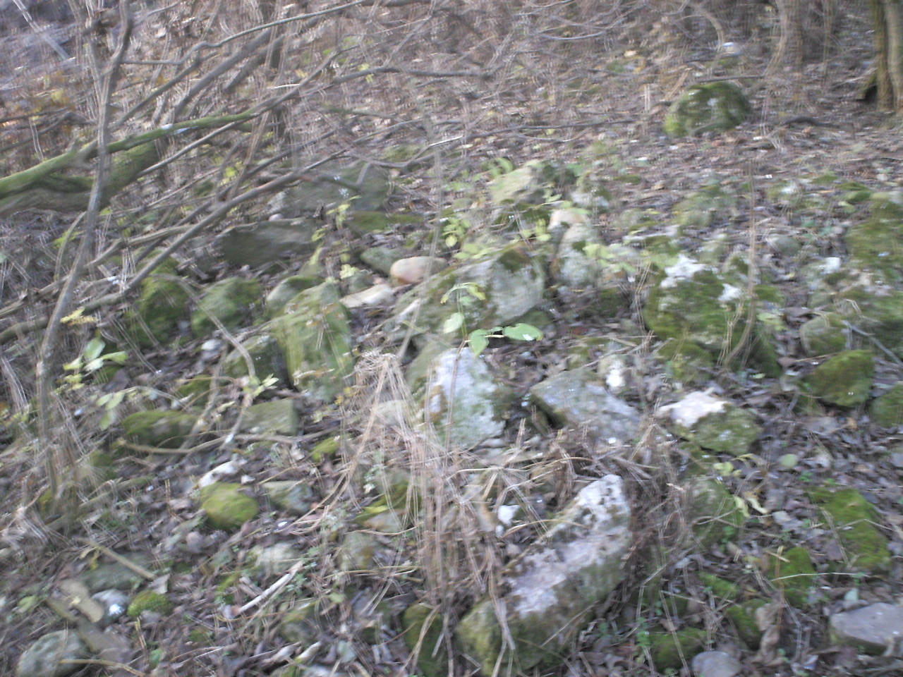 Bruchsteinhaufen im Weingartl bei Zwentendorf/NÖ, möglicherweise noch vom südöstlichen Fächerturm des Kohortenkastells stammend.